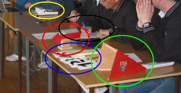 Stolik sędziowski z oznaczonymi najważniejszymi przedmiotami w różnych kolorach.